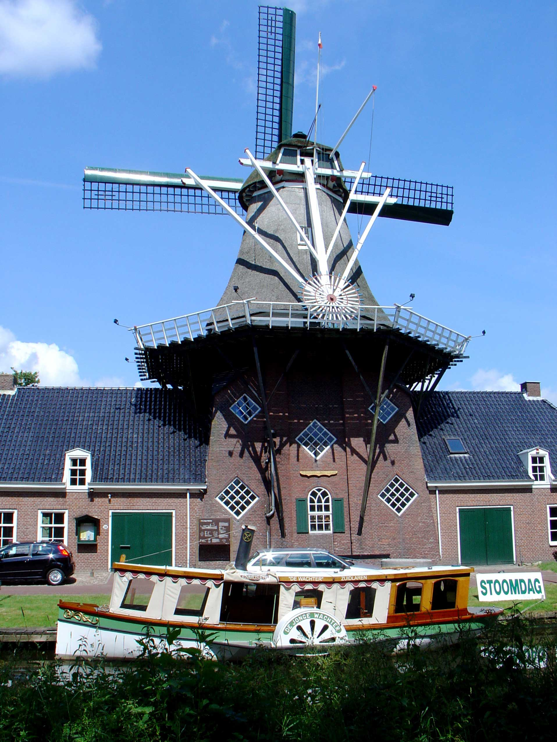 molen De Wachter in Zuidlaren